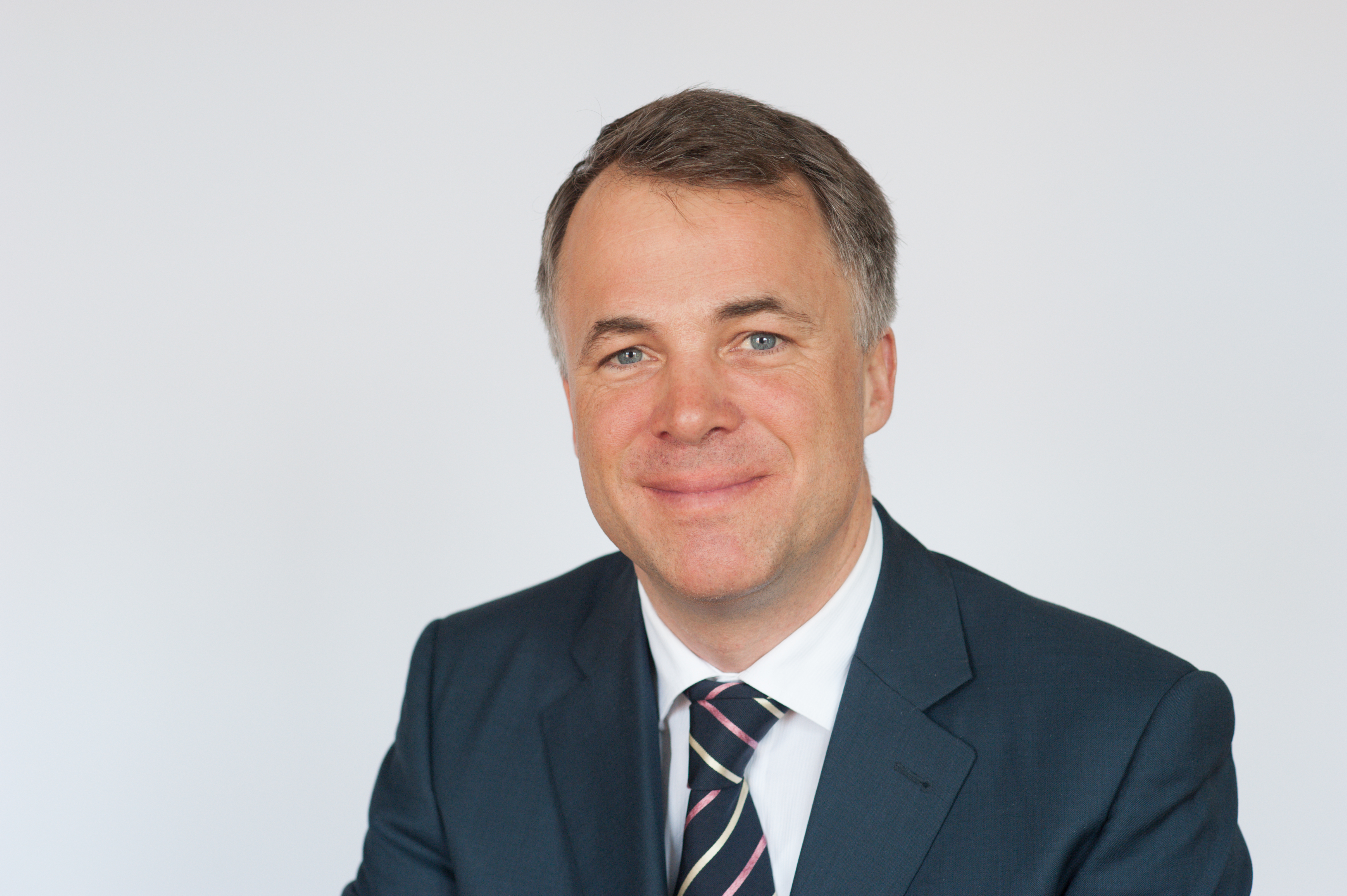 Portrait von Dirk Markus